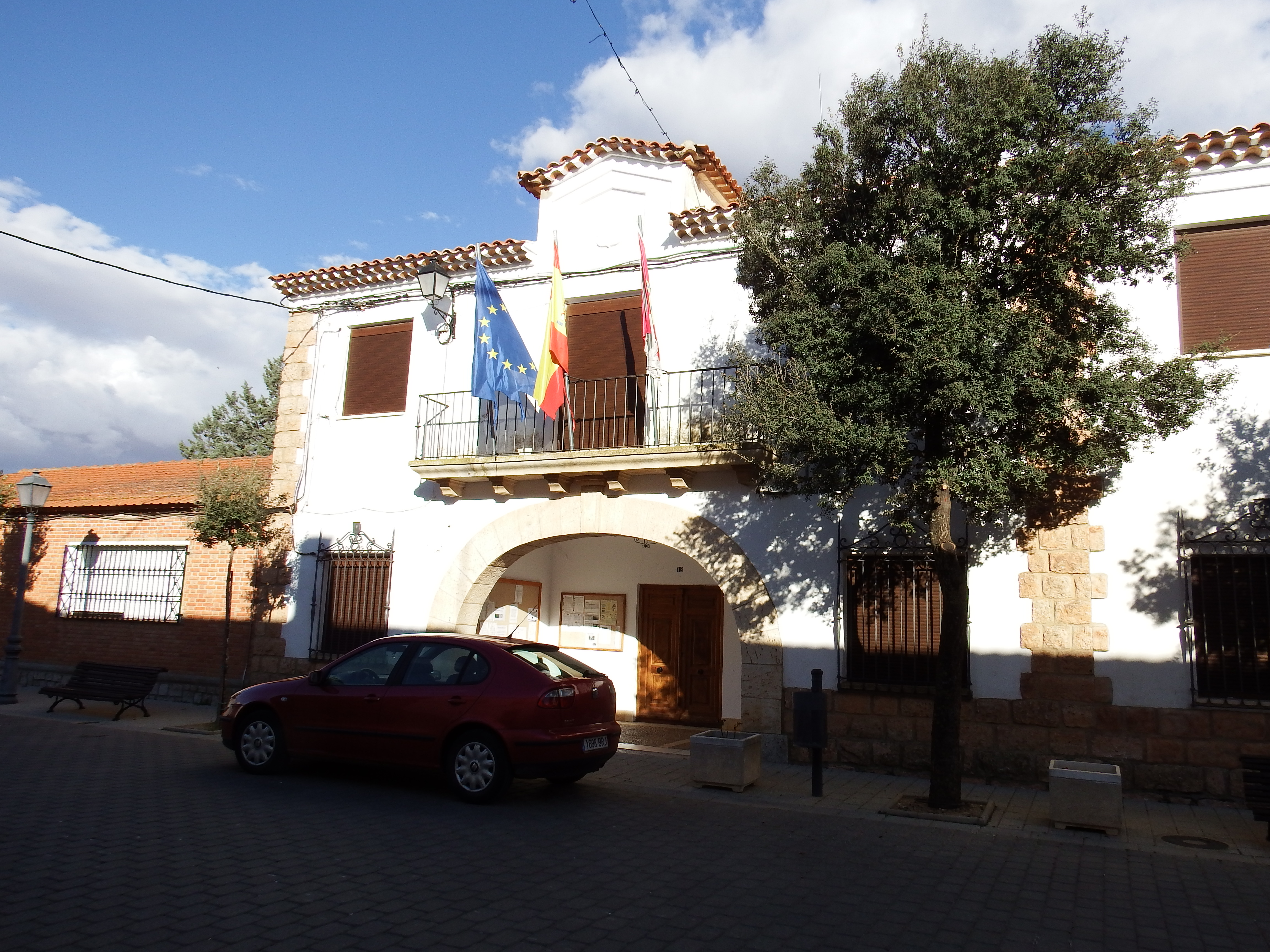 Montalvos